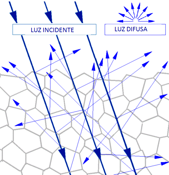 difusão dos raios